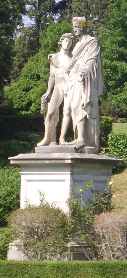 see fileneme